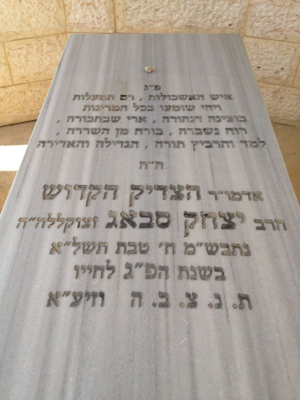 מצבת קברו של הרב יצחק סבאג זצ"ל